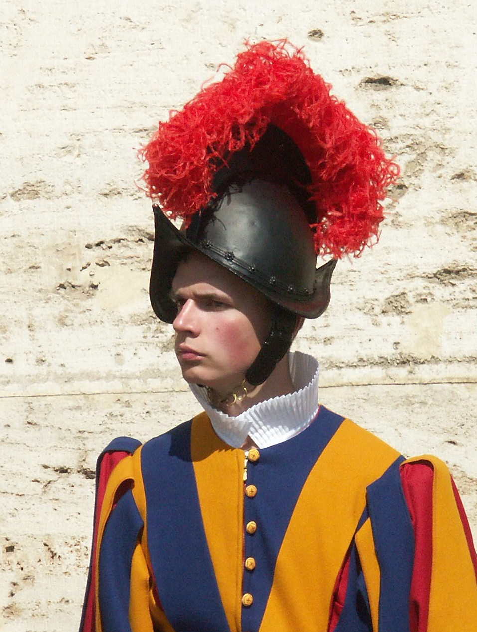 Rom, Vatikan, Soldat der Schweizer Garde